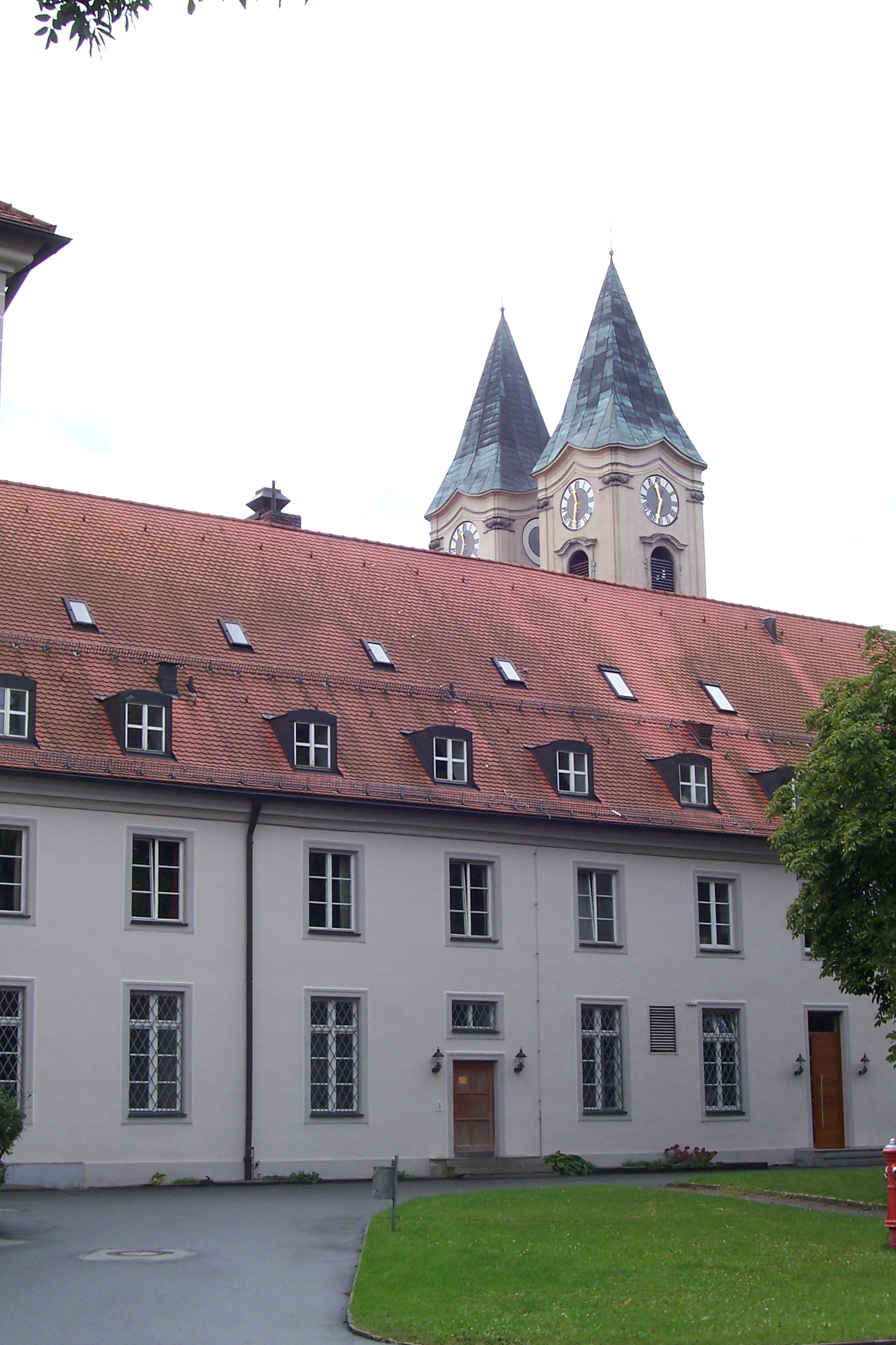 Küche und Speisesäle des Klosters Niederaltaich mit Blick auf die Basilika